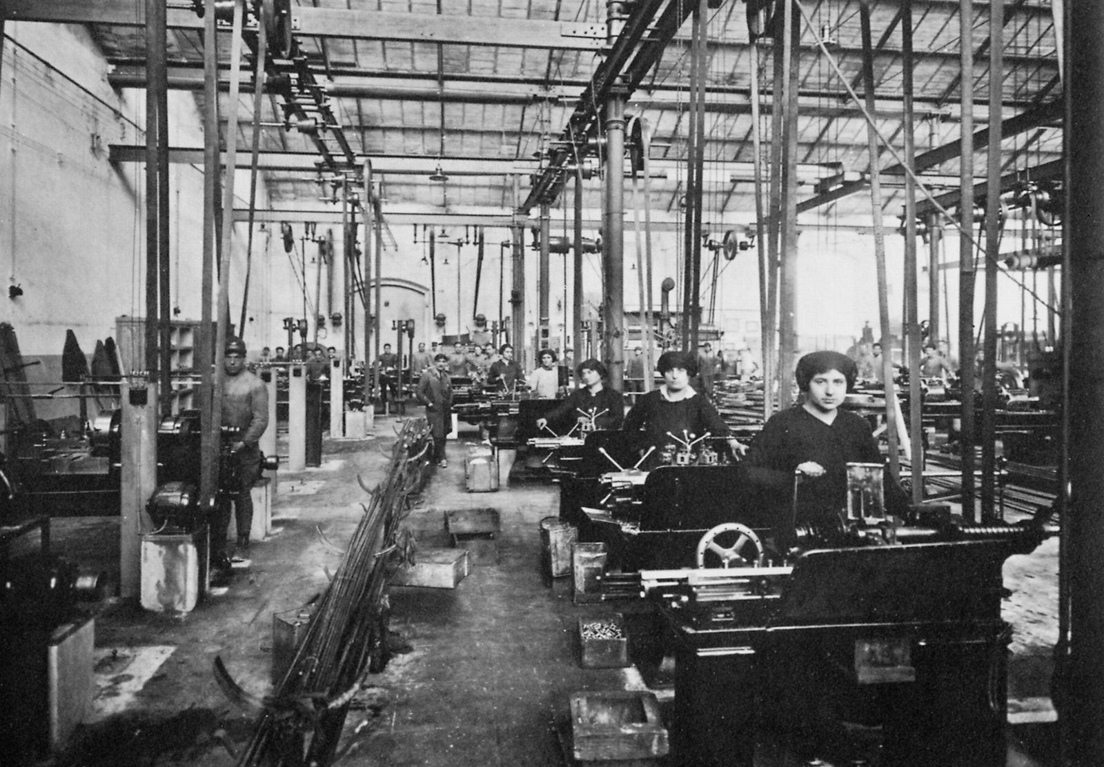 Gebrüder Alinari: Frauen bei der Arbeit in der Gallileo Werkstatt